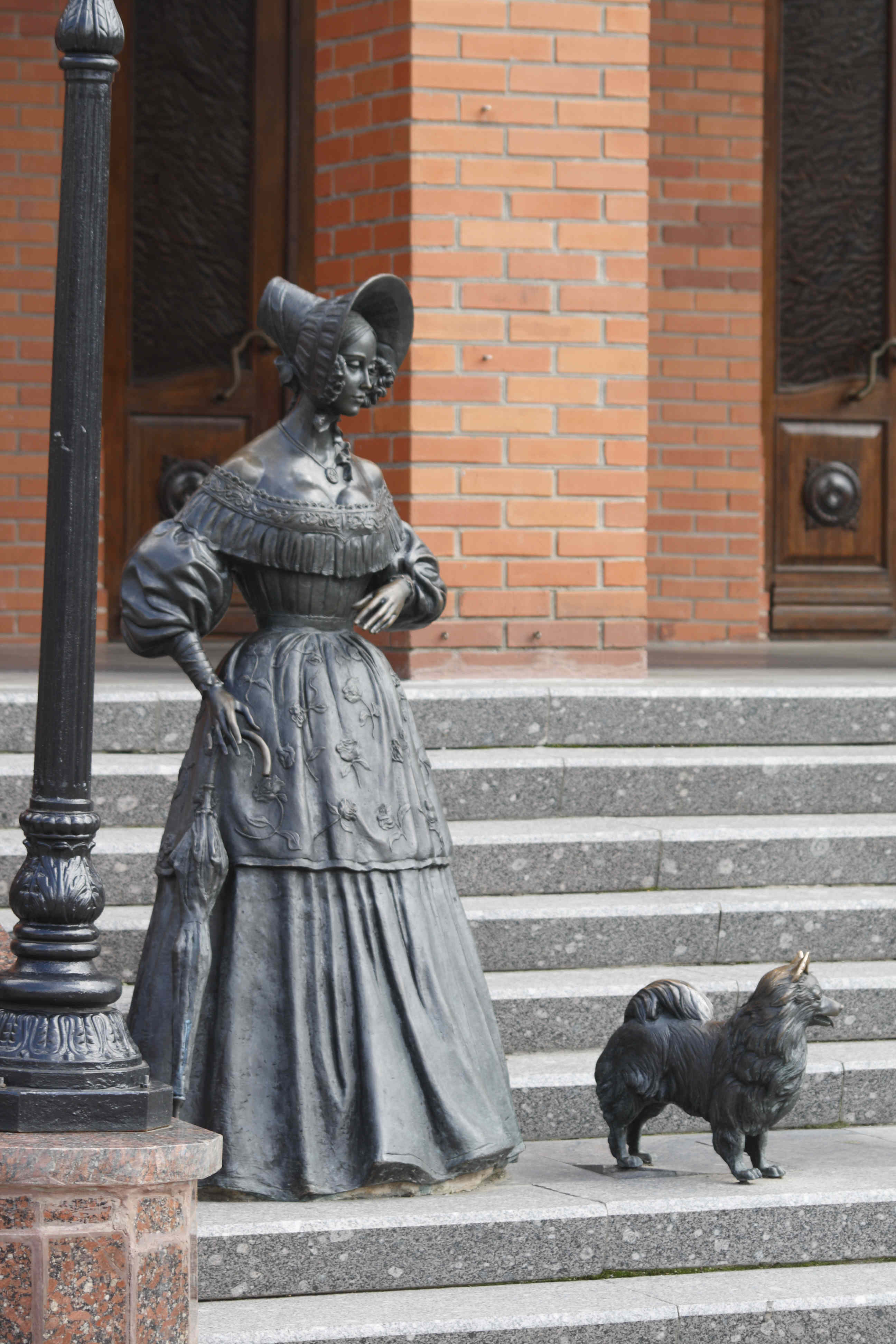 Lady&dog